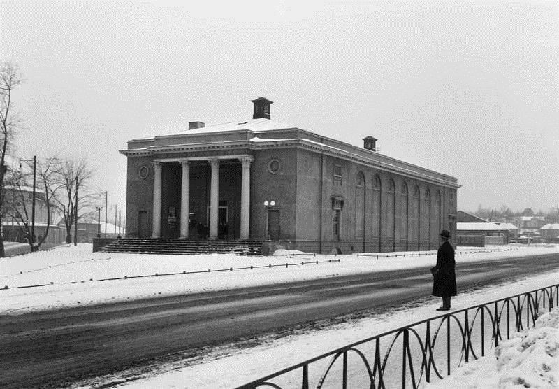 Kinopaleet, Oslo